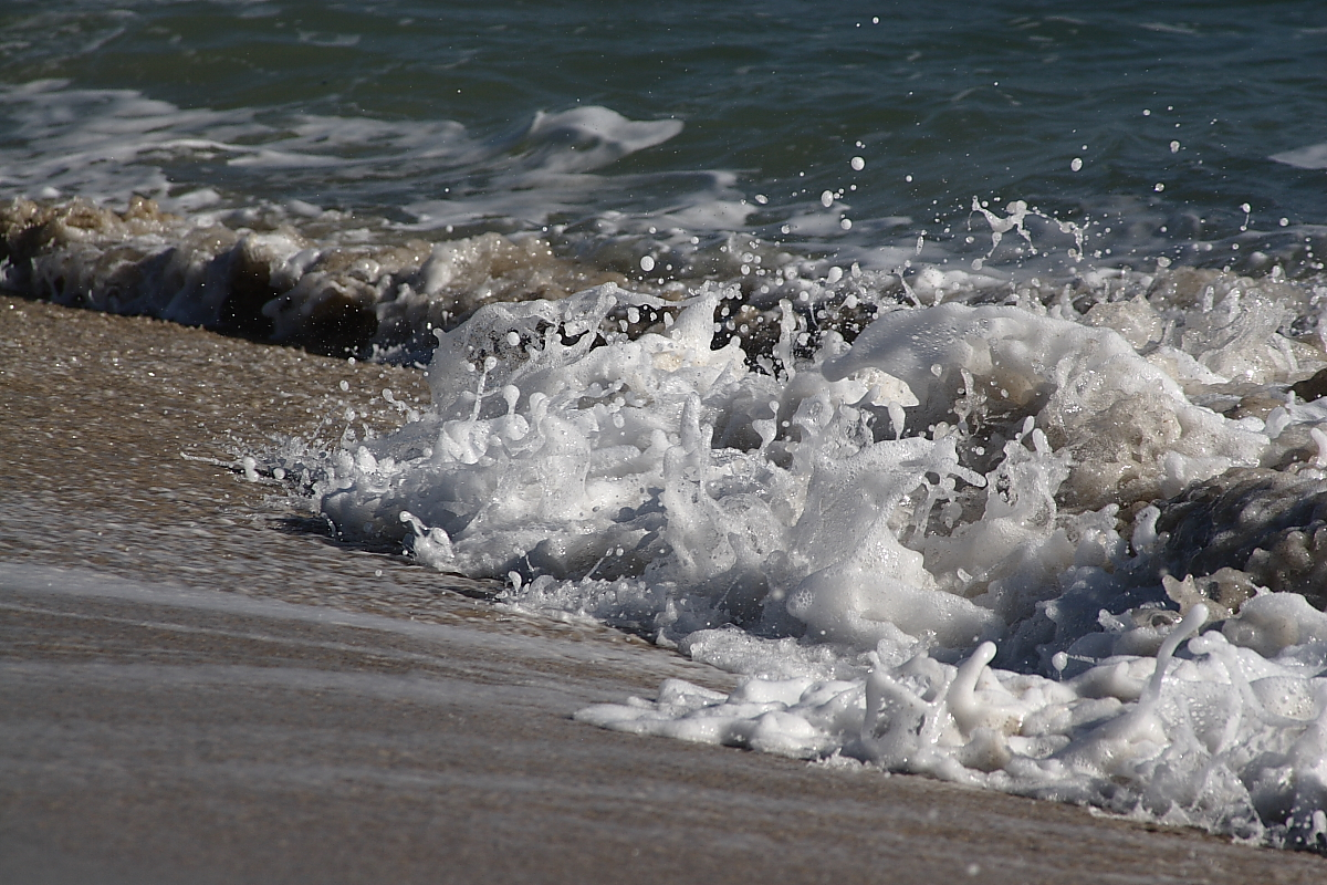 Sea foam, Vero Beach, Florida